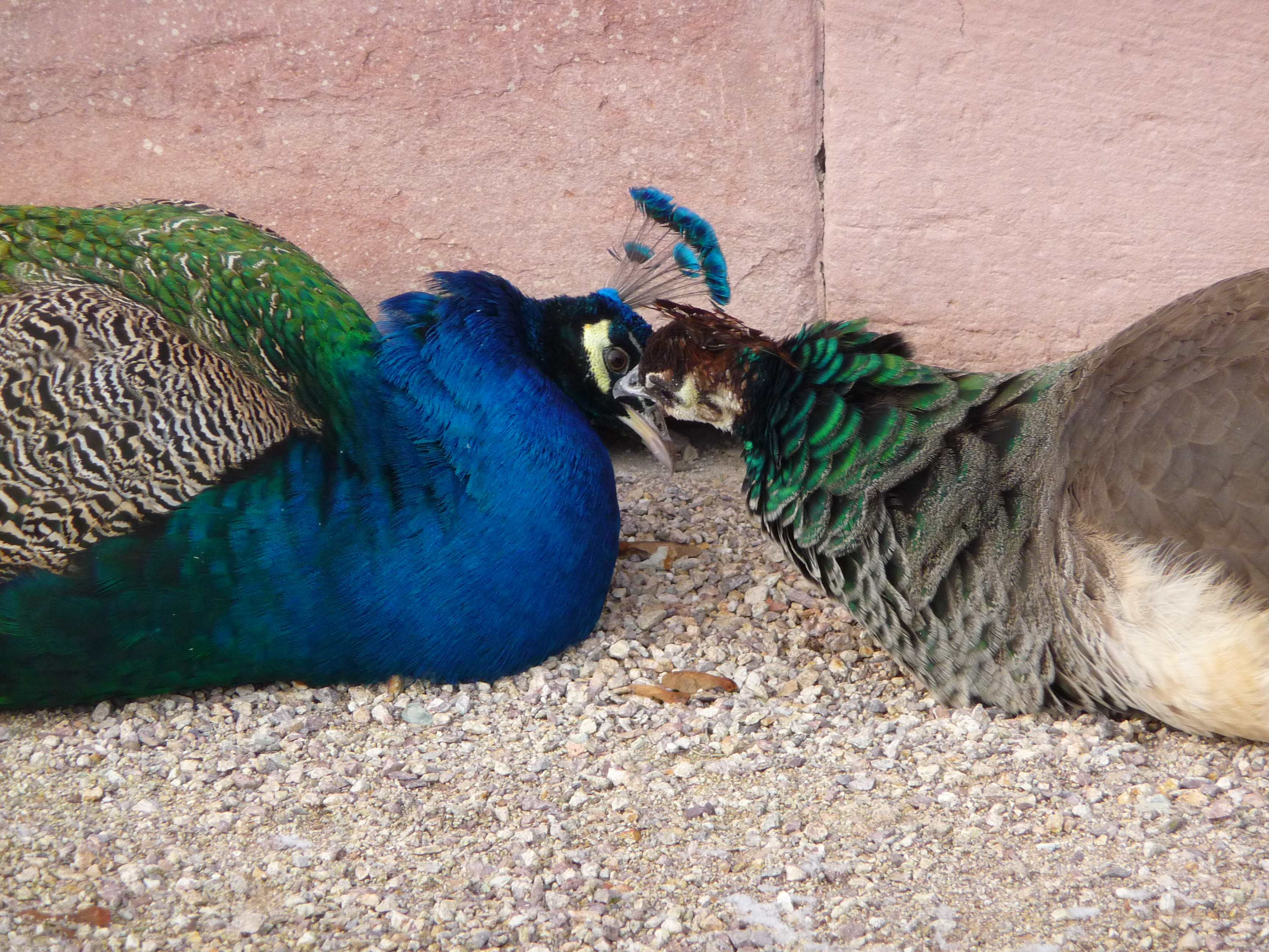 Zärtlichkeiten zwischen zwei Blauen Pfauen (Pavo cristatus) bei einer Außentemperatur von -10 Grad Celsius